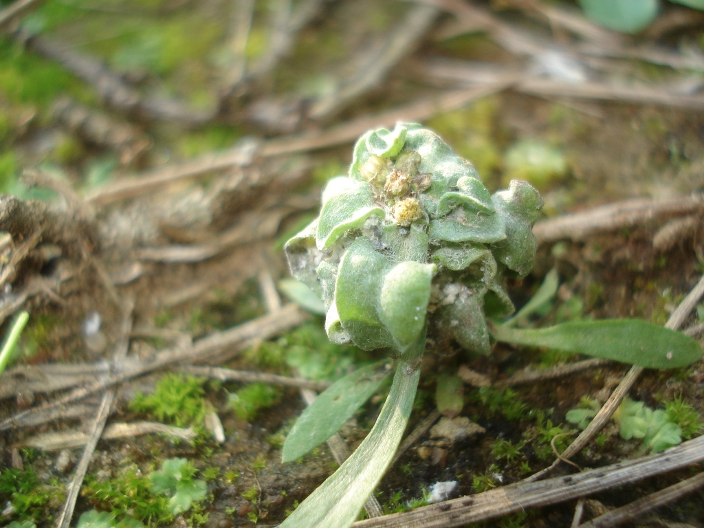 Aceria origani.